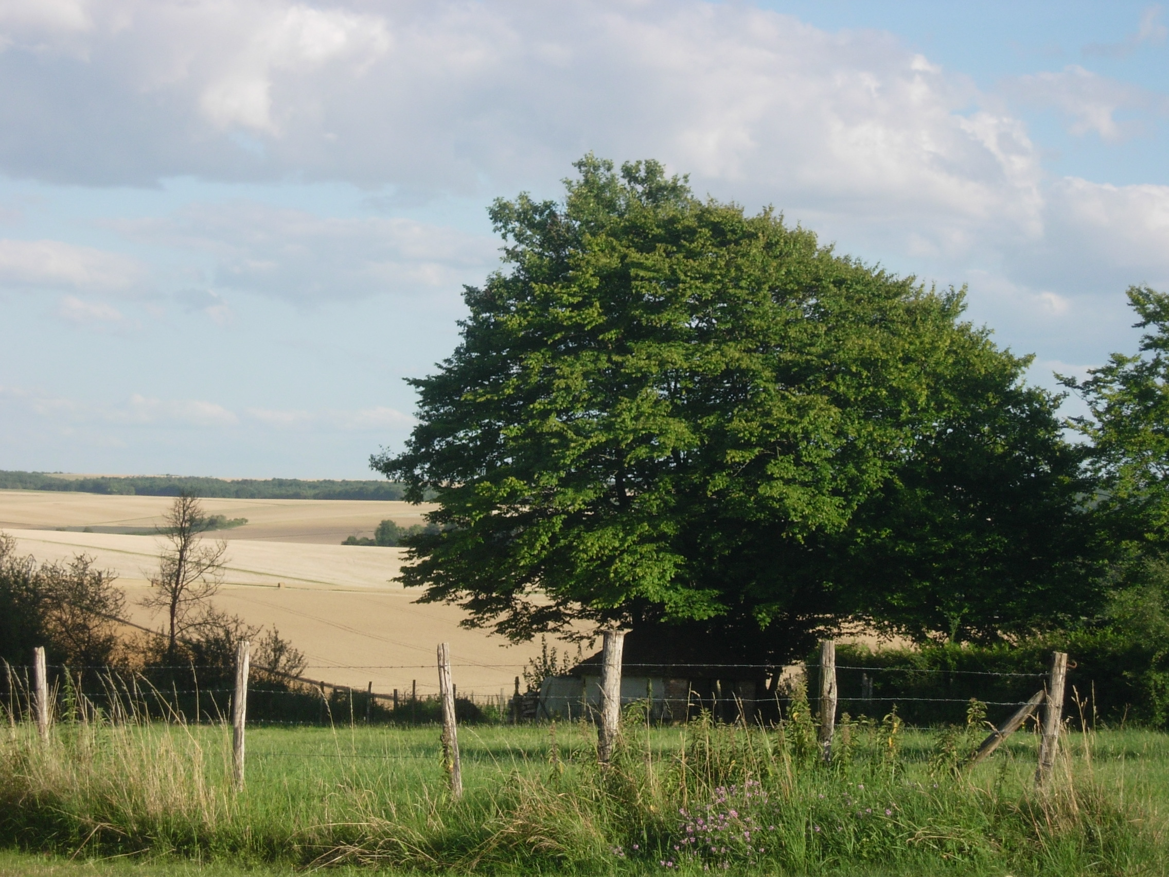 Vue depuis Prusy (Aube)